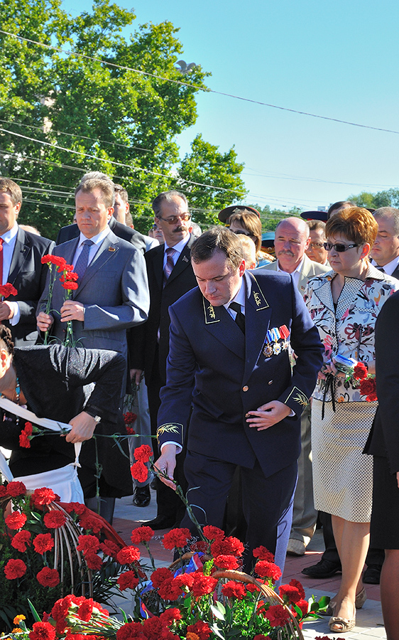 Владимир Ястребчак на Дне Республики 2010 года